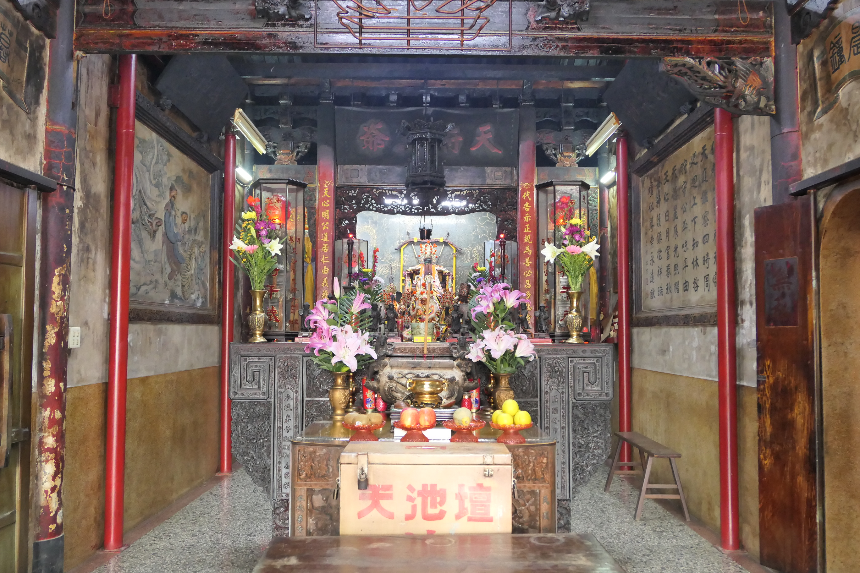 南廠天池壇內景